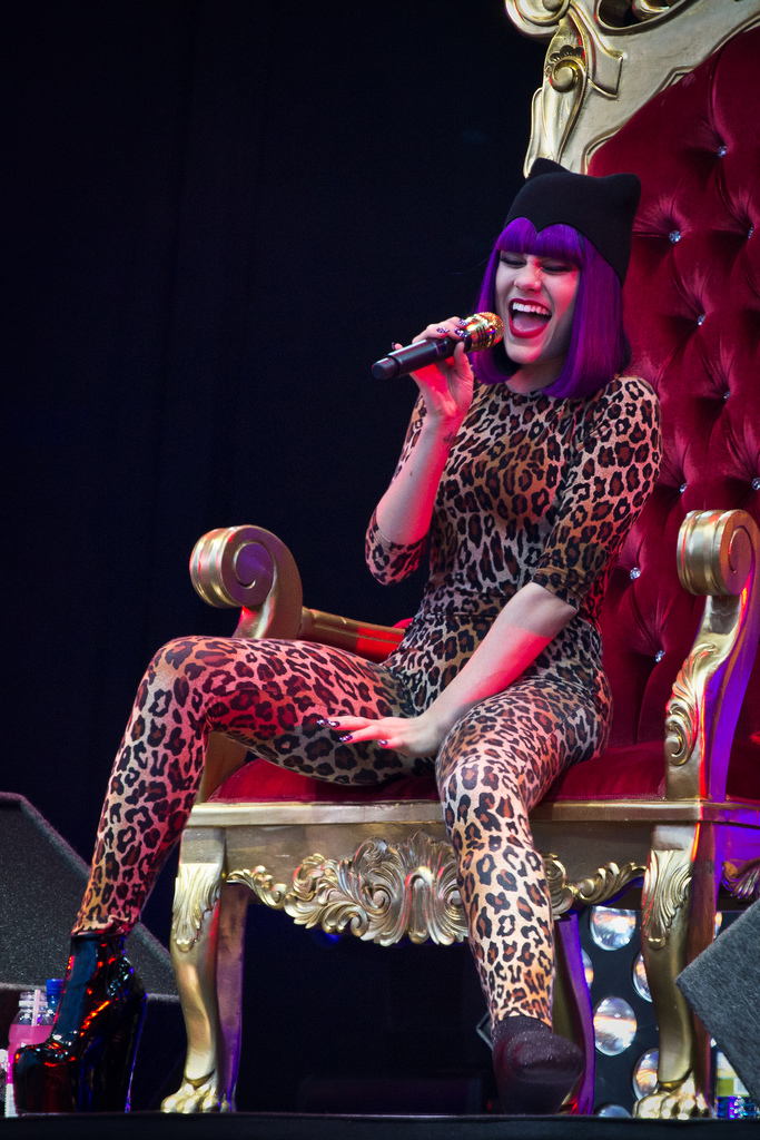 Jessie en el festival The Big Chill 2011.